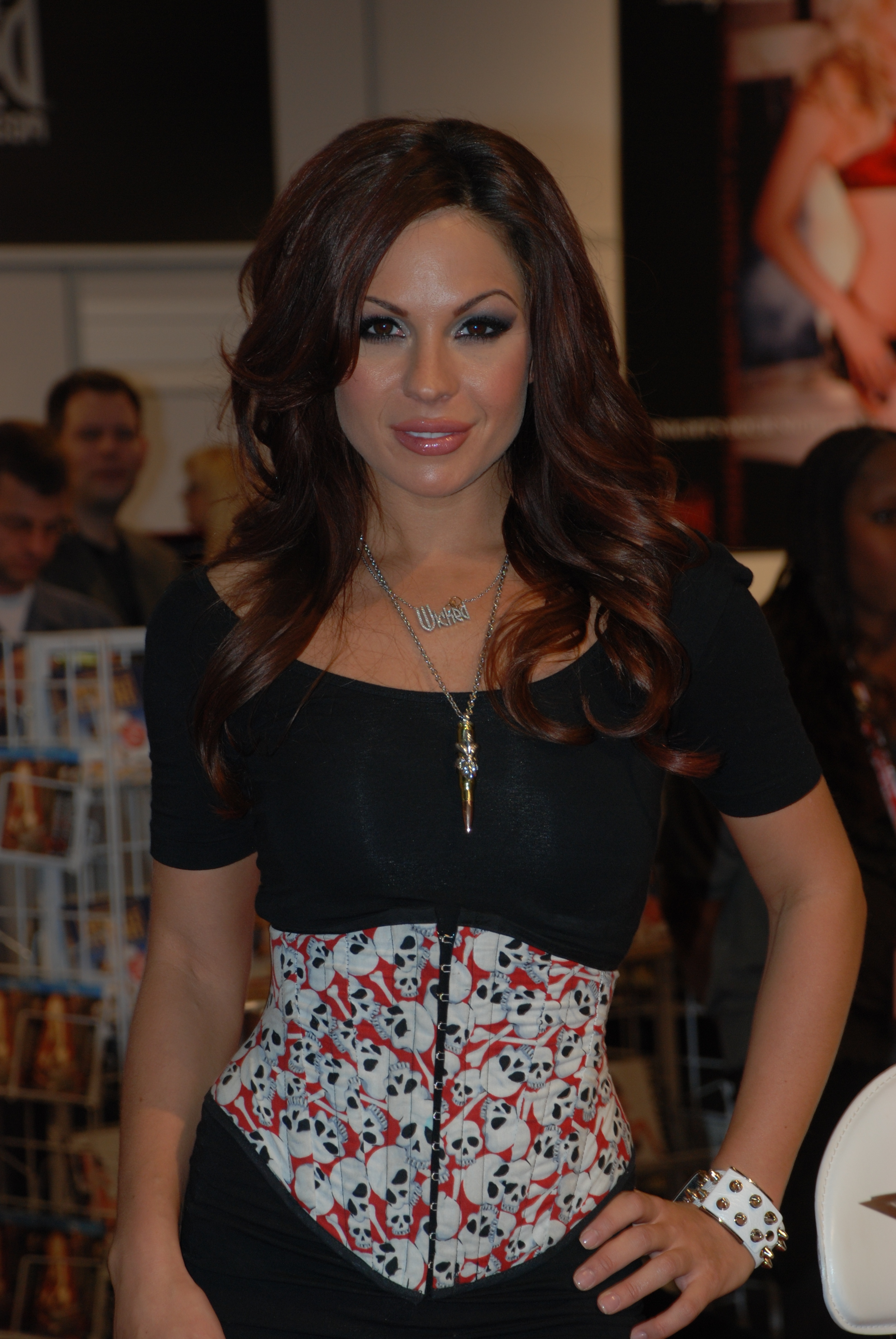 AEE2009_Jan09_Nikon 213